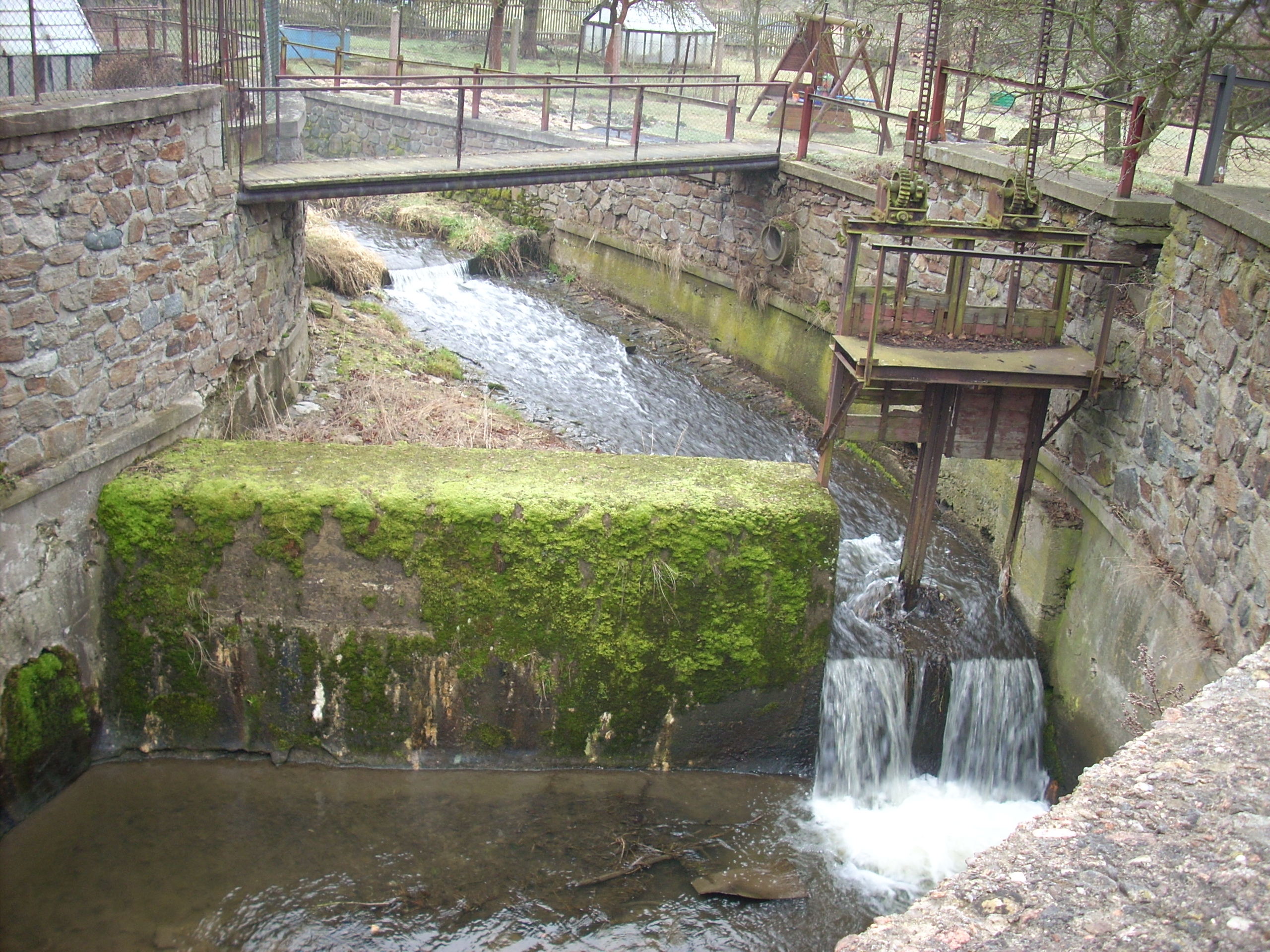 Ochozský potok, Polná